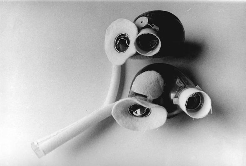 Rostock, Forschungsprojekt "Künstliches Herz" ADN-ZB Sindermann 8.12.88 Rostock: Forschungsprojekt "Künstliches Herz" Die Klinik für Innere Medizin (KIM) der Wilhelm-Pieck-Universität konnte mit einer Forschungsgruppe unter der Leitung von OMR Prof. Dr. sc. med. Dr. h.c.mult. Horst Klinkmann (Direktor der KIM, Beauftragter der Hauptforschungsrichtung "Künstlicher Organersatz und Biomaterialien") bei den medizinischen und technischen Arbeiten für die Entwicklung eines künstlichen Herzens auf internationale Ergebnisse aufbauen. Nach langjährigen Forschungen und Entwicklungen in interdisziplinärer Zusammenarbeit mit Forschungsinstituten, Hochschulen und Industriebetrieben der DDR und in RGW-Kooperation mit Kustherzzentren in der UdSSR und der CSSR sowie auf der Basis eines Regierungsabkommens mit Japan (Nationalinstitut für kardiovaskuläre Forschung Hiroshima) steht an der KIM ein humanadaptiertes Kunstherz zur Verfügung, das zur Überbrückung bis zur Herztransplantation eingesetzt werden kann. Es kann sich in Größe, Gewicht und Leistung mit den Kunstherzen der Welt messen. Unser Foto zeigt ein Rostocker künstliches Herz mit rechter und linker Herzkammer und den dazugehörigen Prothesen.